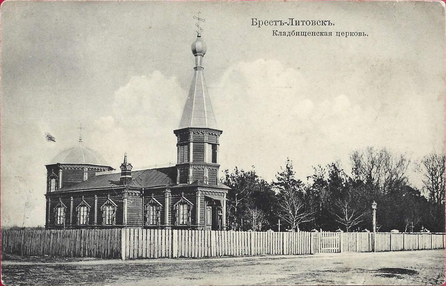 Беларуская (тарашкевіца): Берасьце (Bieraście), Трышын (Tryšyn). Могілкавая царква